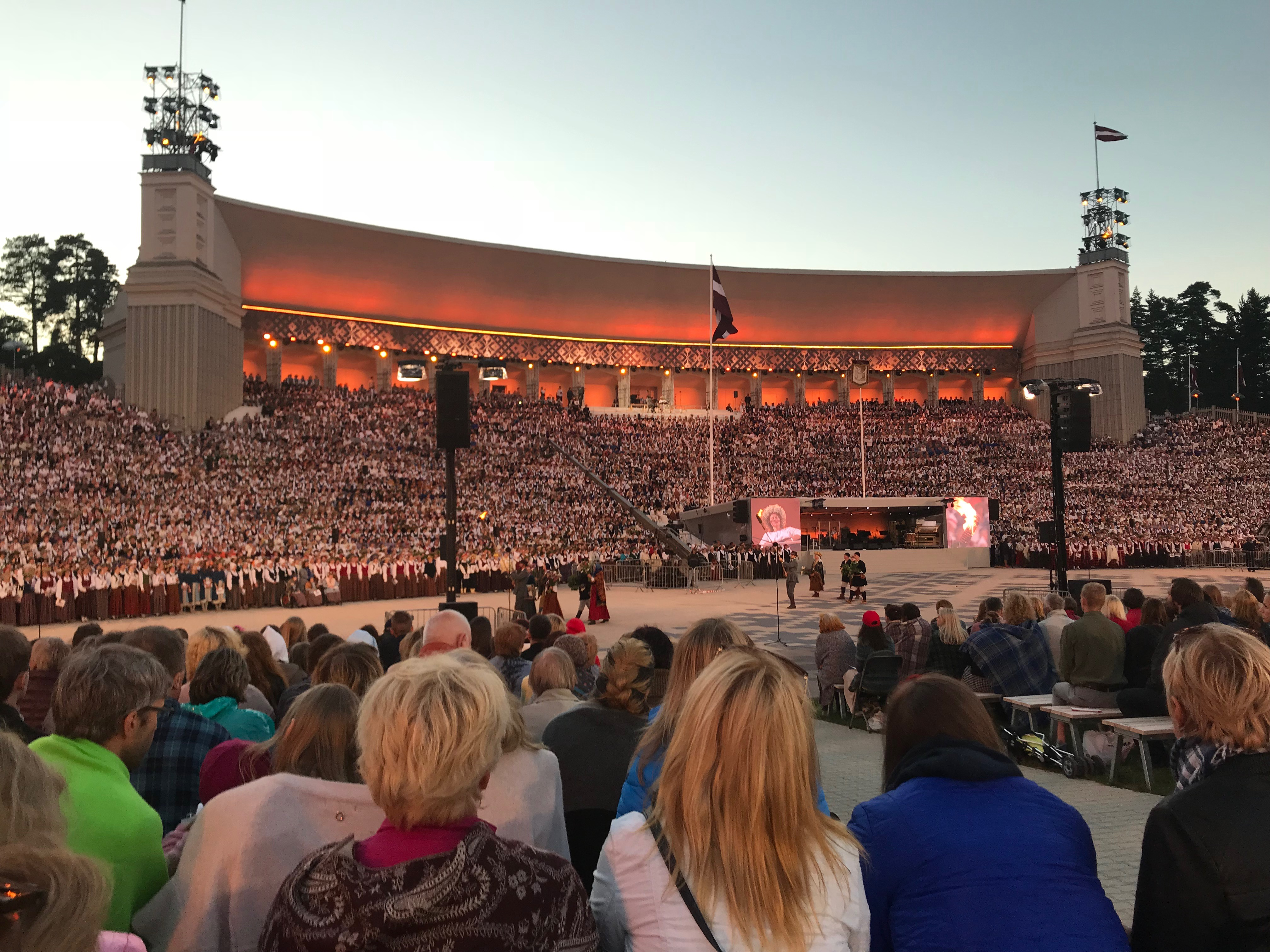 Festival Nacional do Cante e Baile Letón